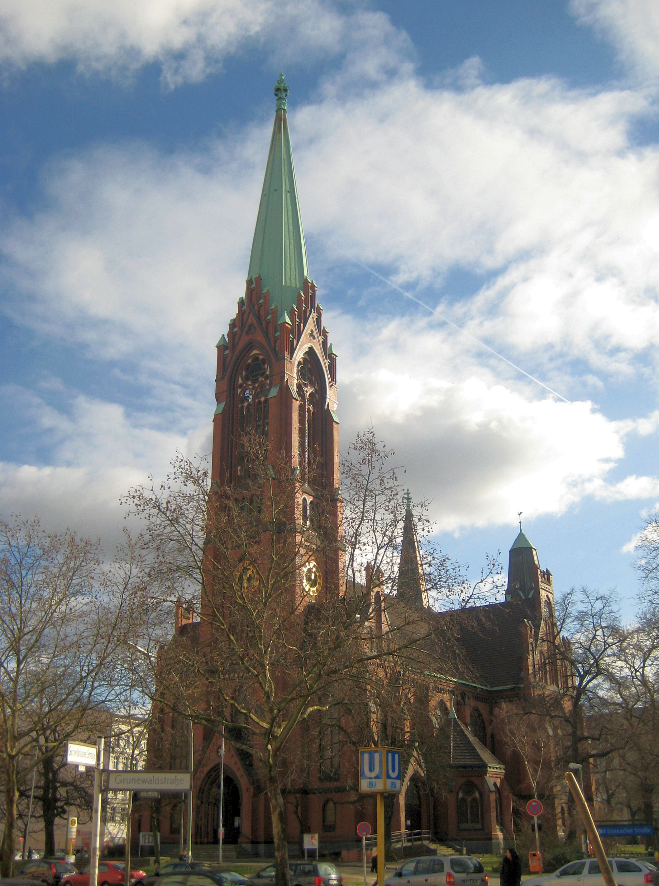 Apostel-Paulus-Kirche in Berlin-Schöneberg, built in 1892-1894 by architect Franz Heinrich Schwechten